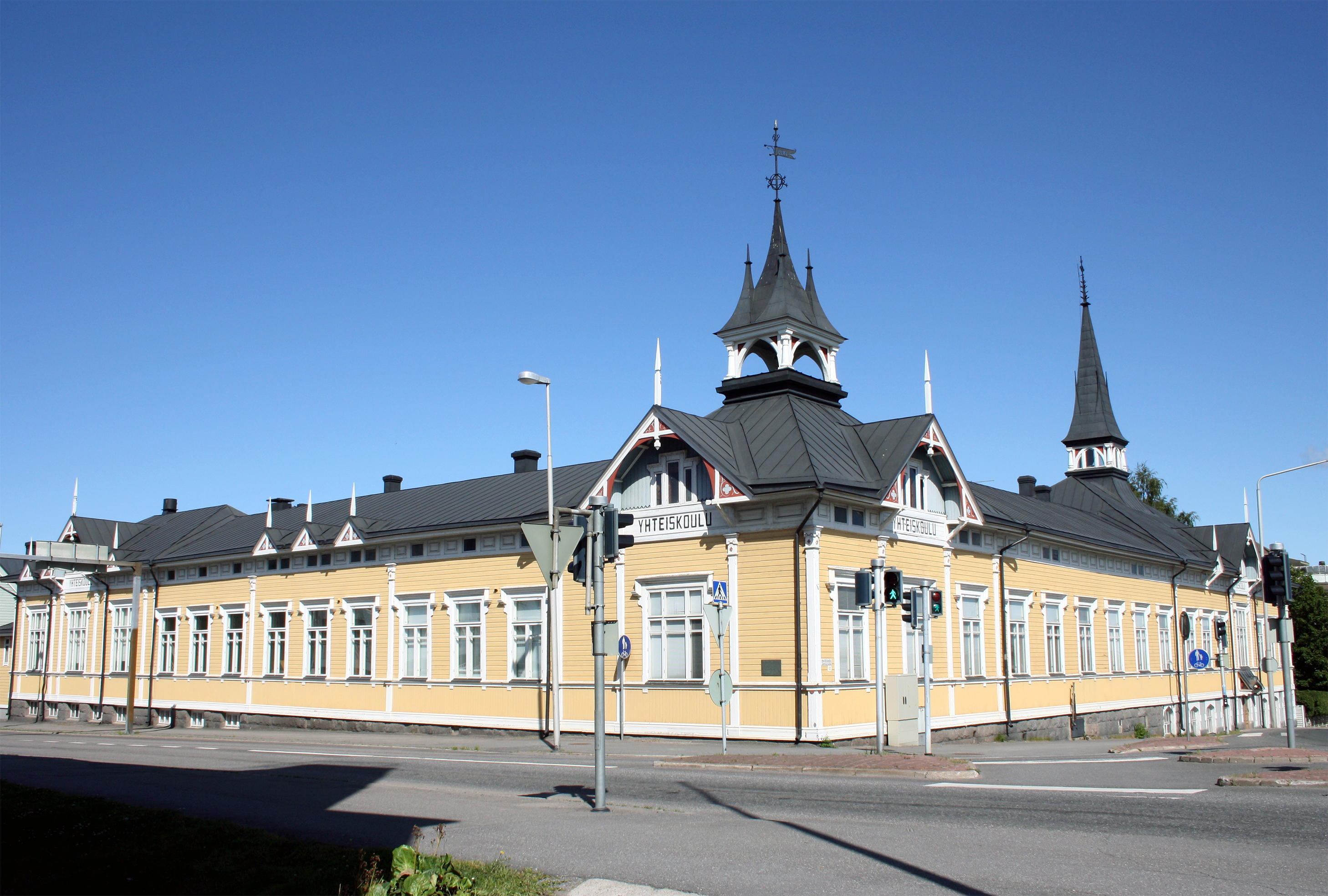 Kokkolan Suomalainen Yhteiskoulu.